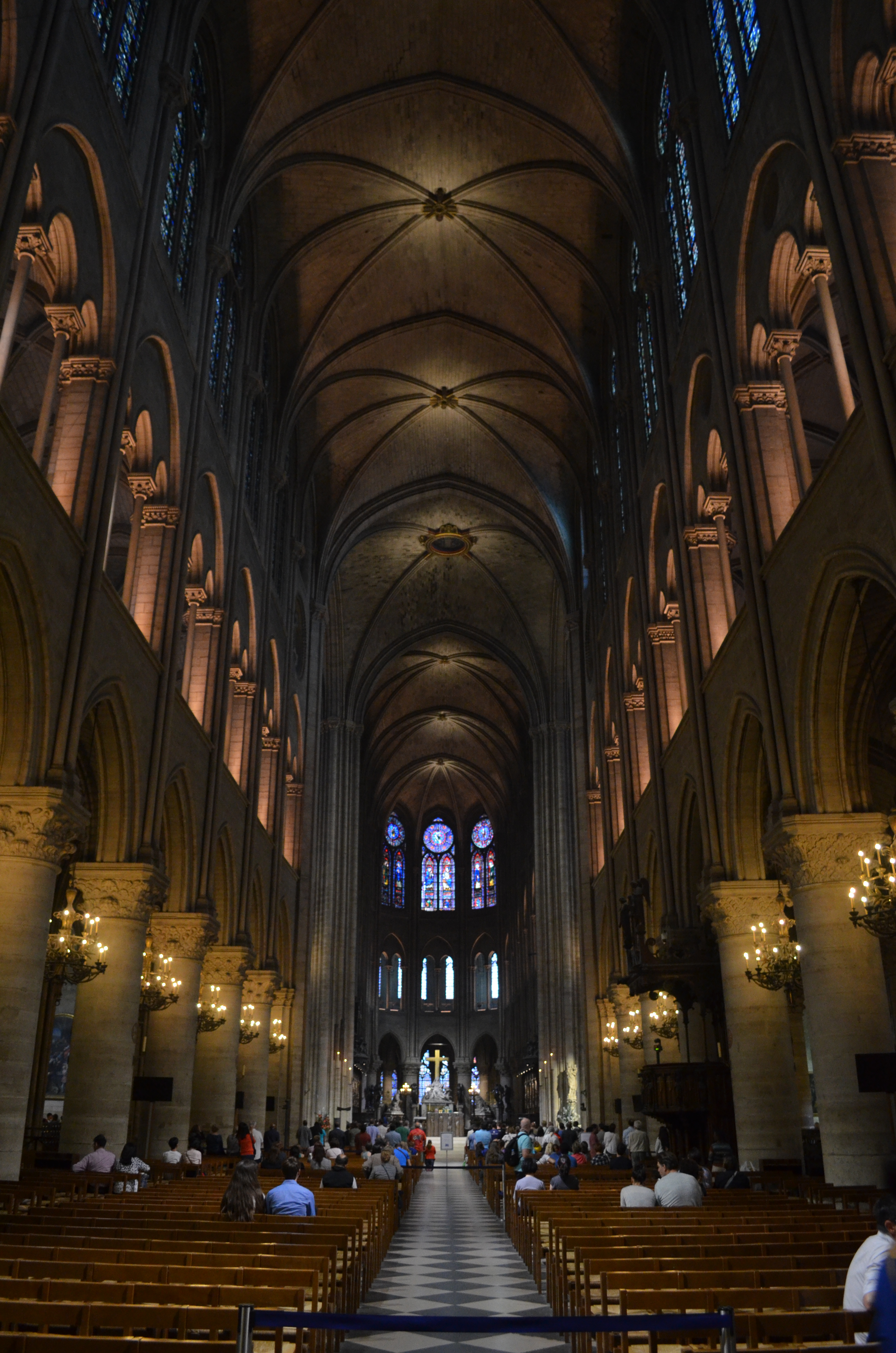 Notre-Dame de Paris in 2016